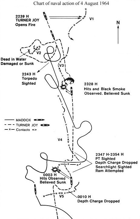 Tonkin-Zwischenfall 4. August 1964